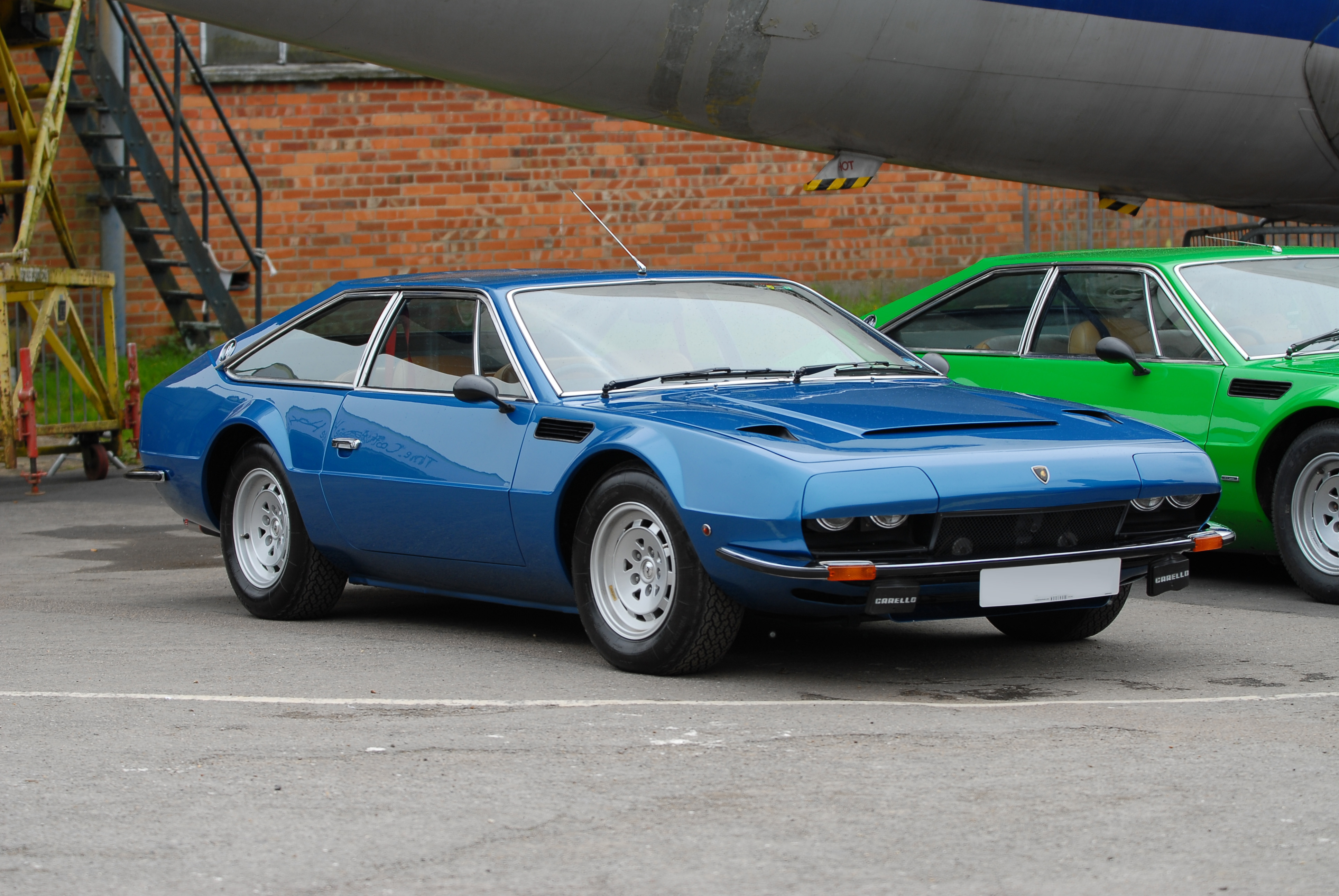 Lamborghini Jarama at AutoItalia Brooklands, May 2012